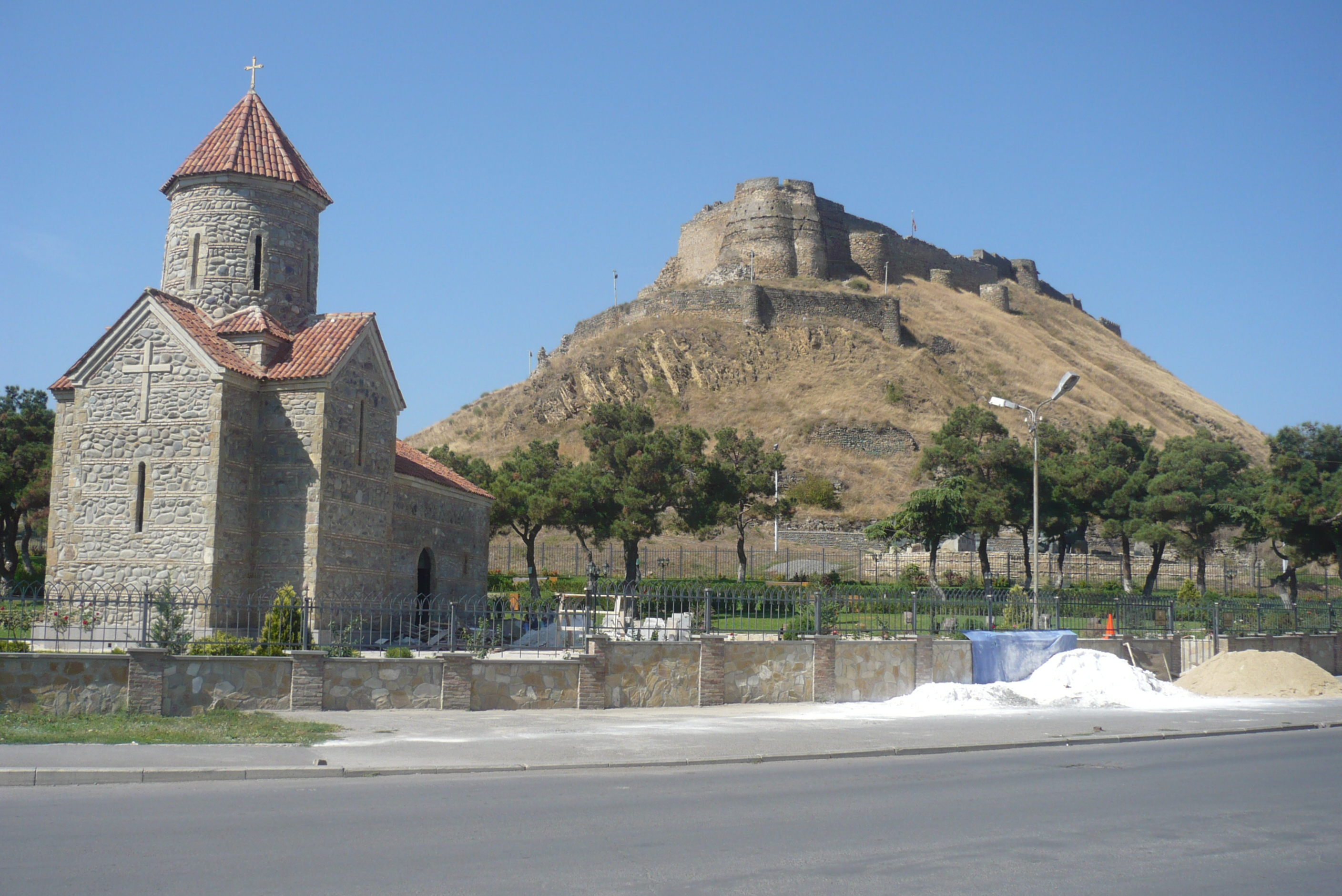 Kostel a Citadela Gori